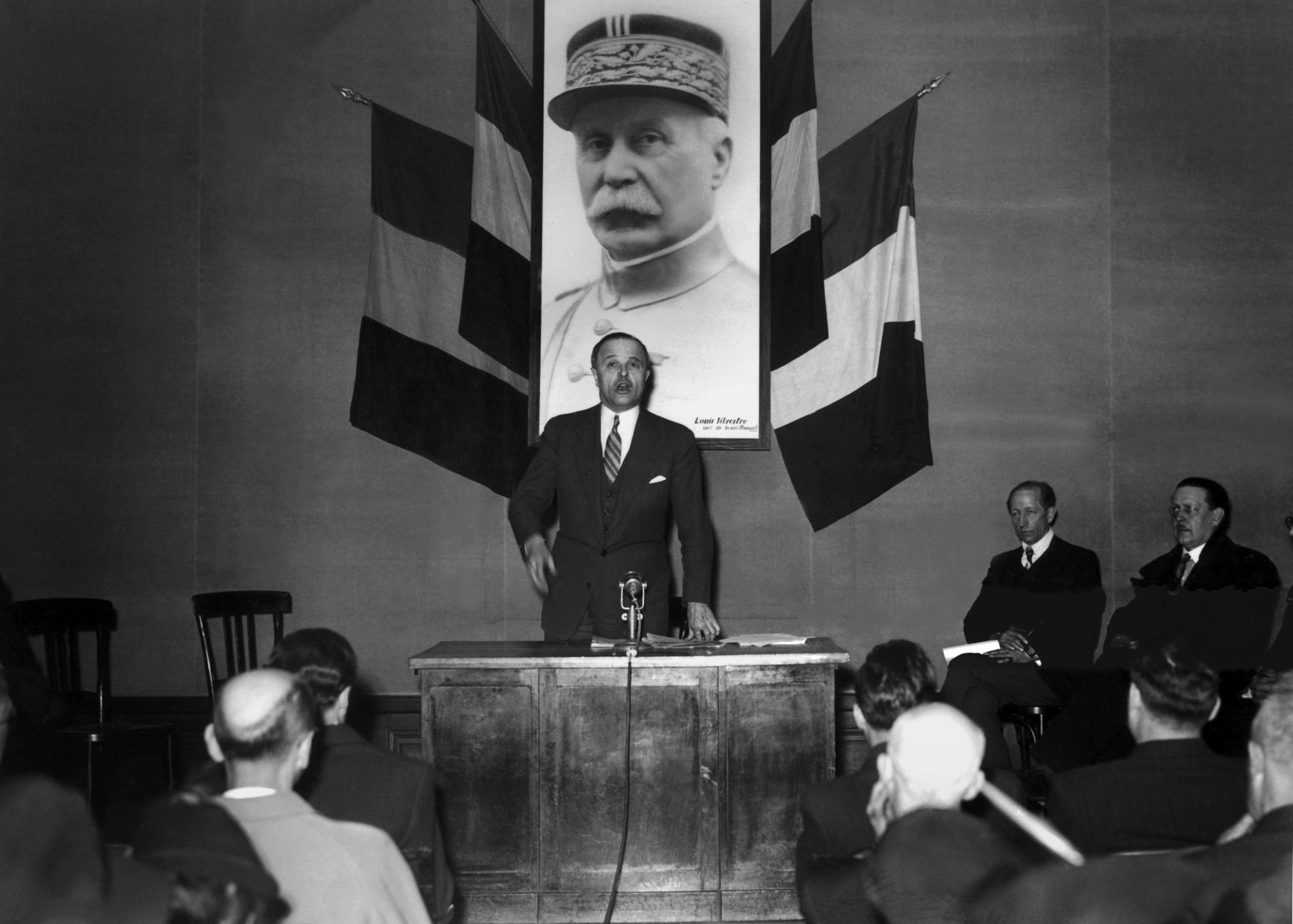 Louis Darquier Of Pellepoix Between 1942-1944